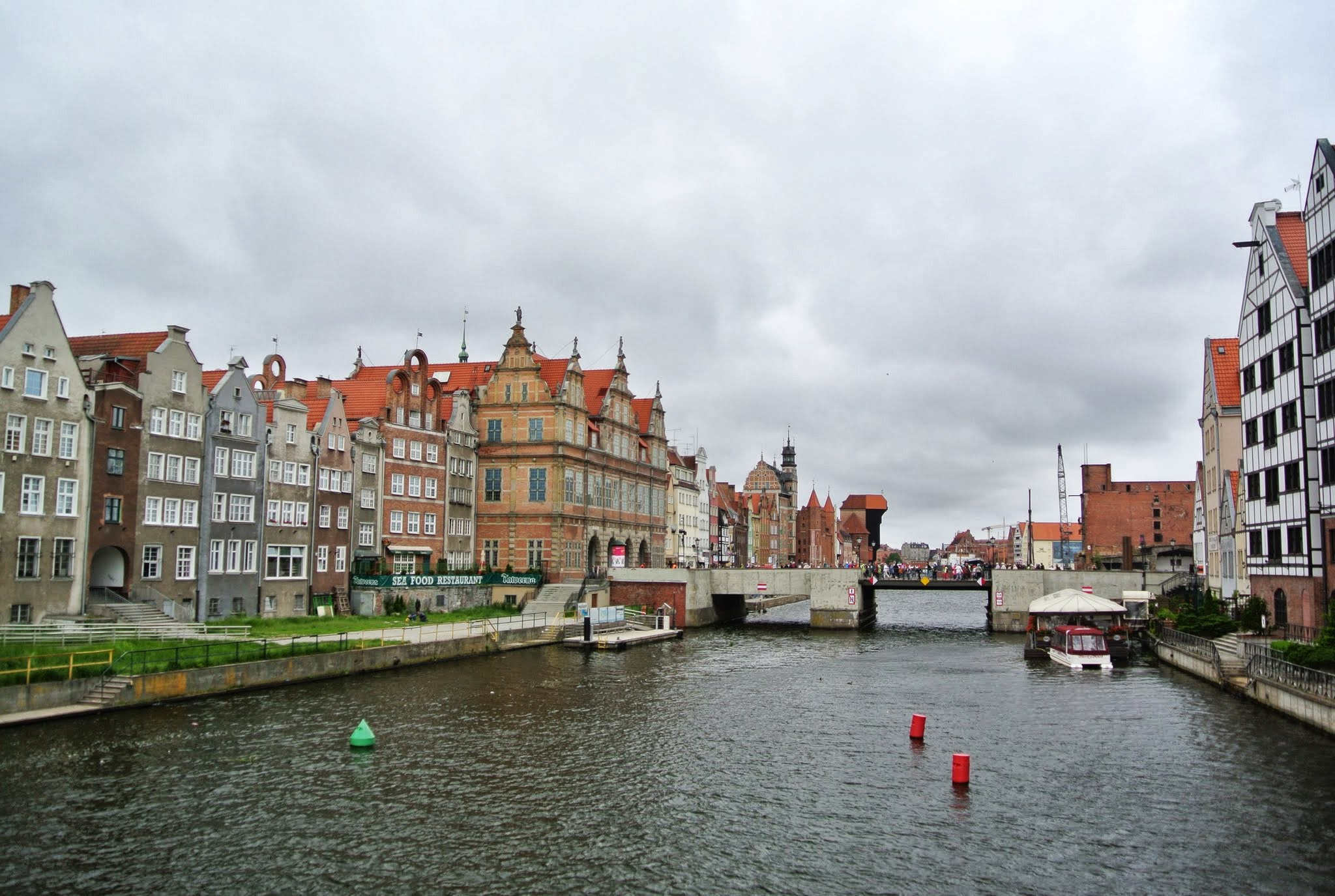 Wyspa Spichrzów, Gdańsk, Poland